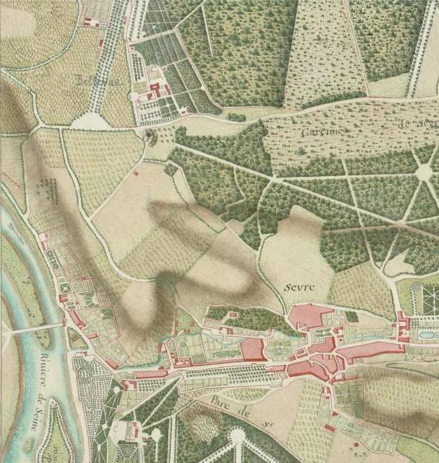 Emplacement vierge du futur château de Bellevue. Vers 1740.